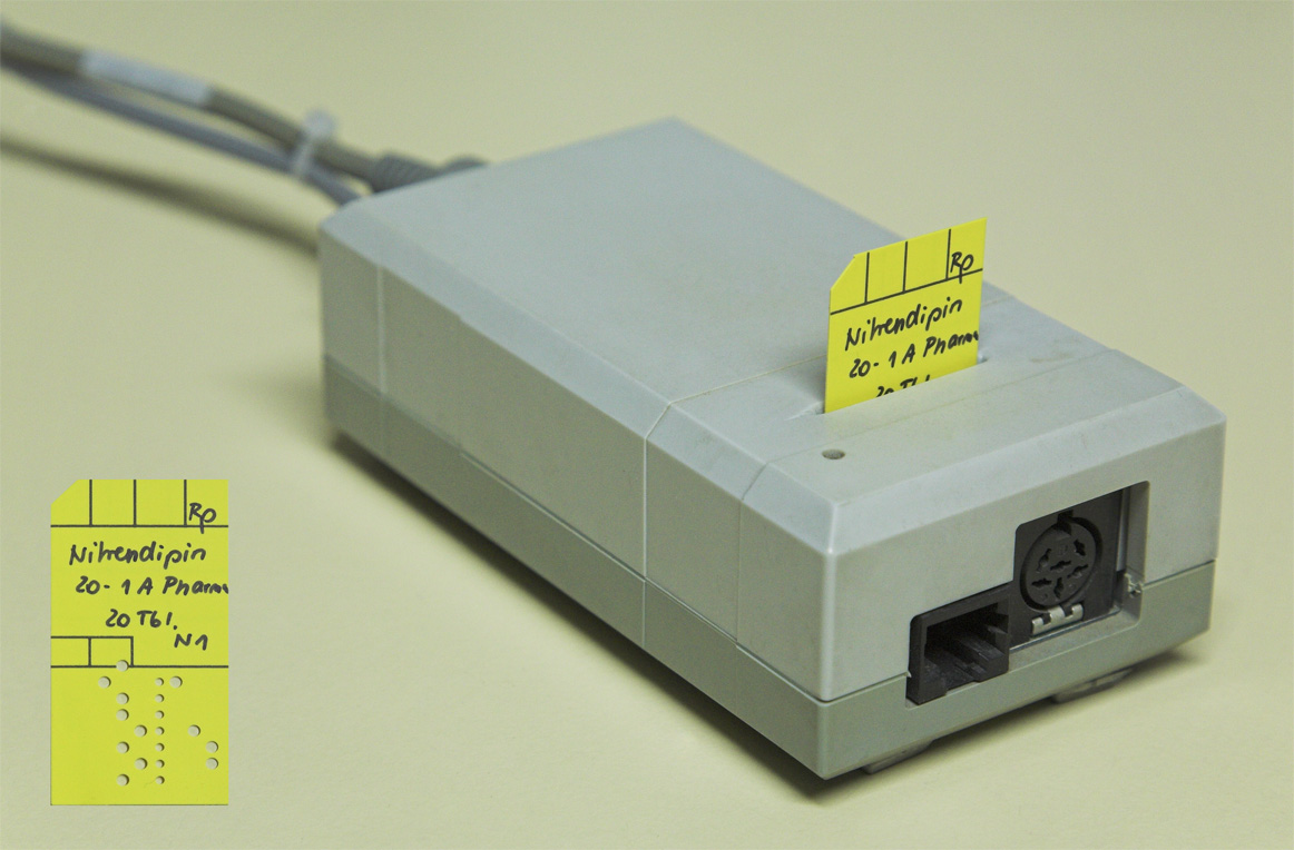 ABDA-Lochkarte und Lesegerät See Modem für Parallelübertragung